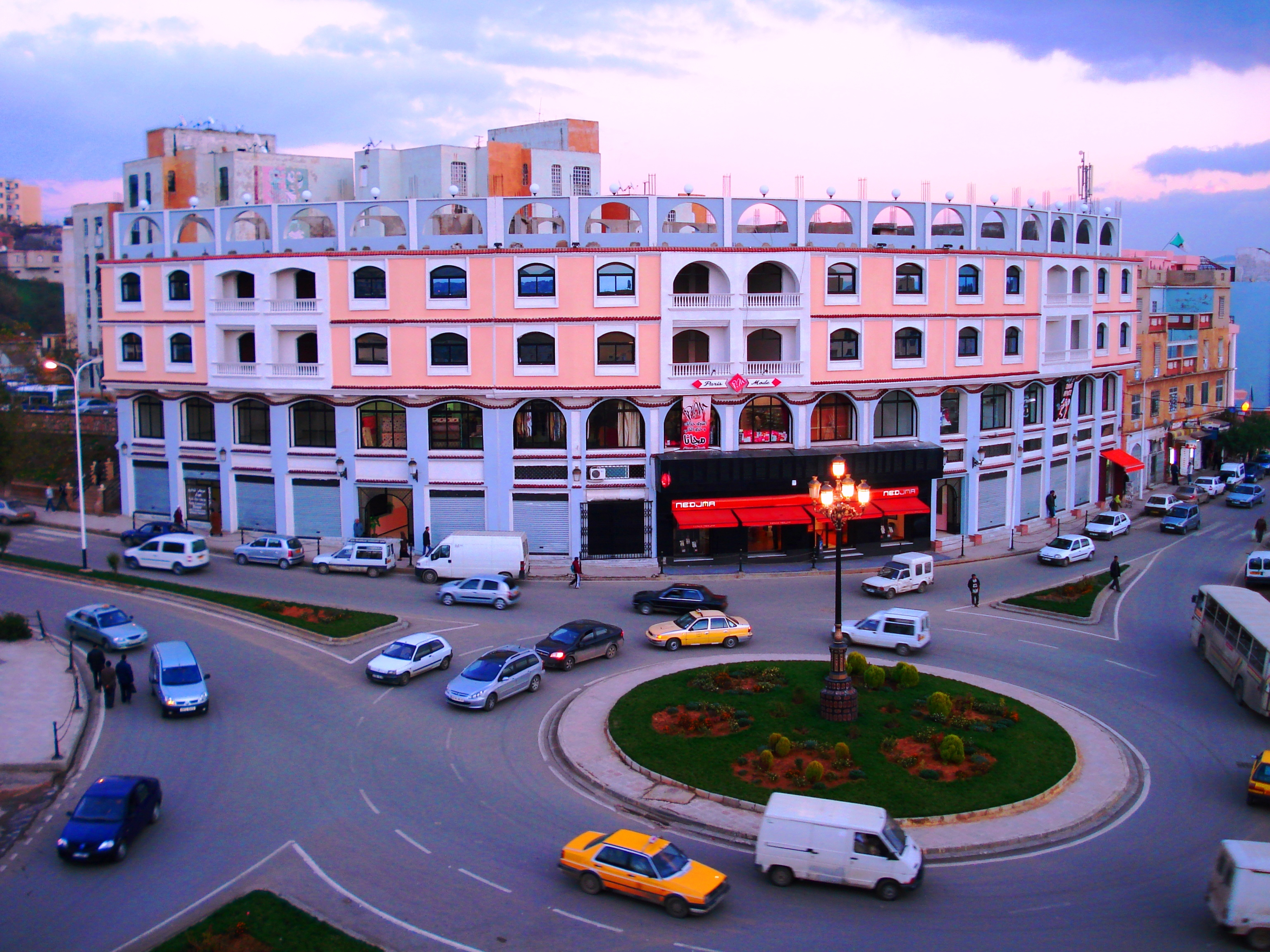 Bazar aouar Médéa